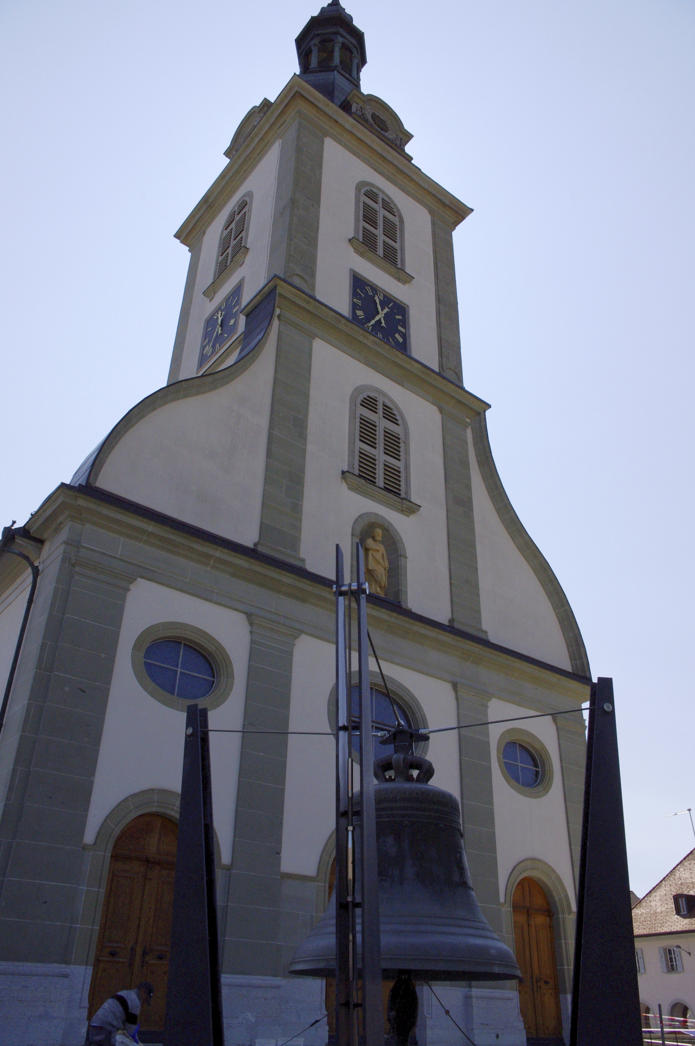 Bulle, Suisse - Église Saint-Pierre-aux-Liens